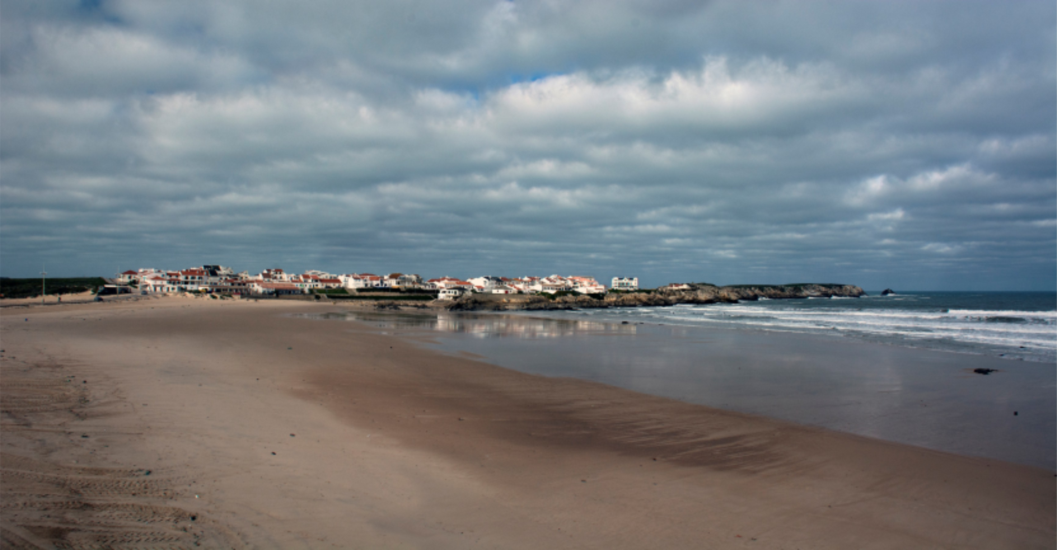 Panorama do Baleal a partir da Praia do Baleal (Norte), janeiro de 2018.